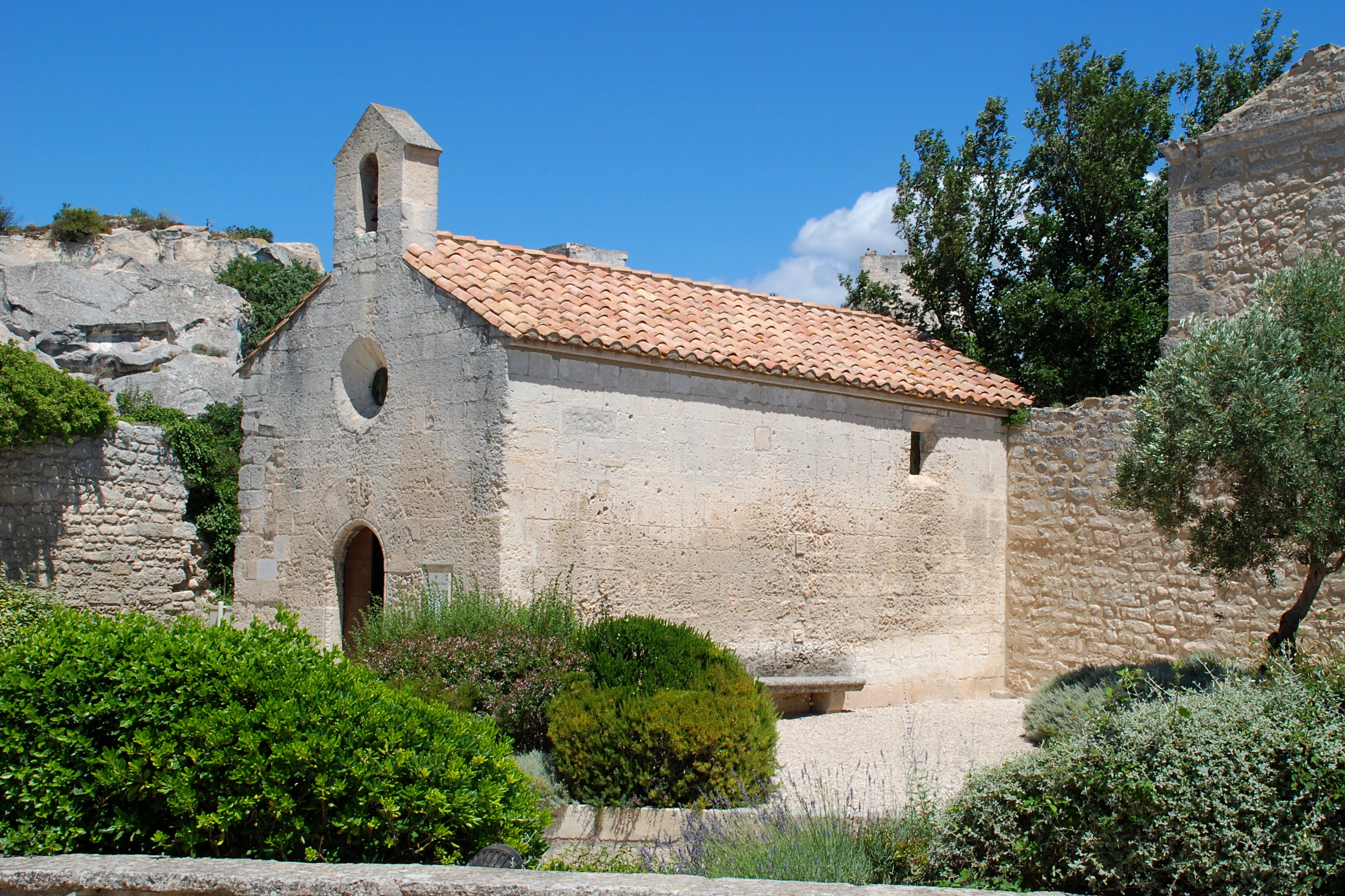 France - Provence - Chapelle Saint-Blaise des Baux-de-Provence